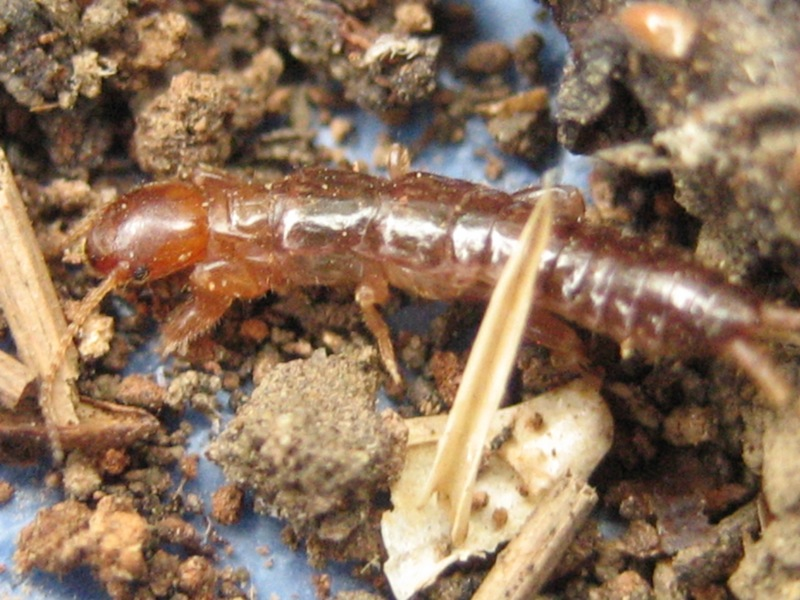 Pink Webspinner (Haploembia solieri), Davis, CA.